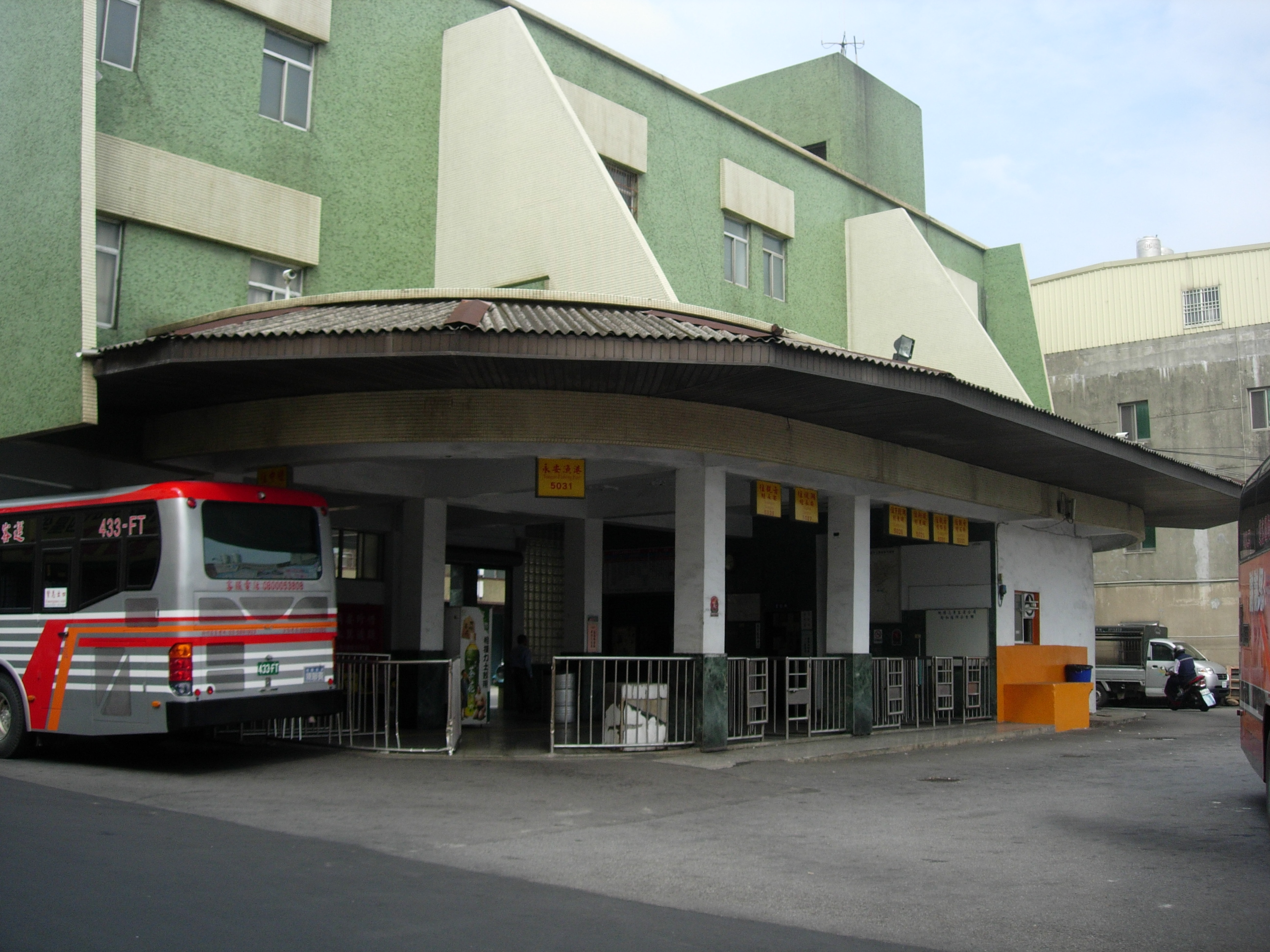 中文（台灣）: 桃園客運新屋站月台。